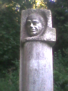 Рафаил Попов - паметник в Мадара